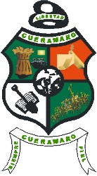 escudo del municipio de cueramaro guanajuato mexico